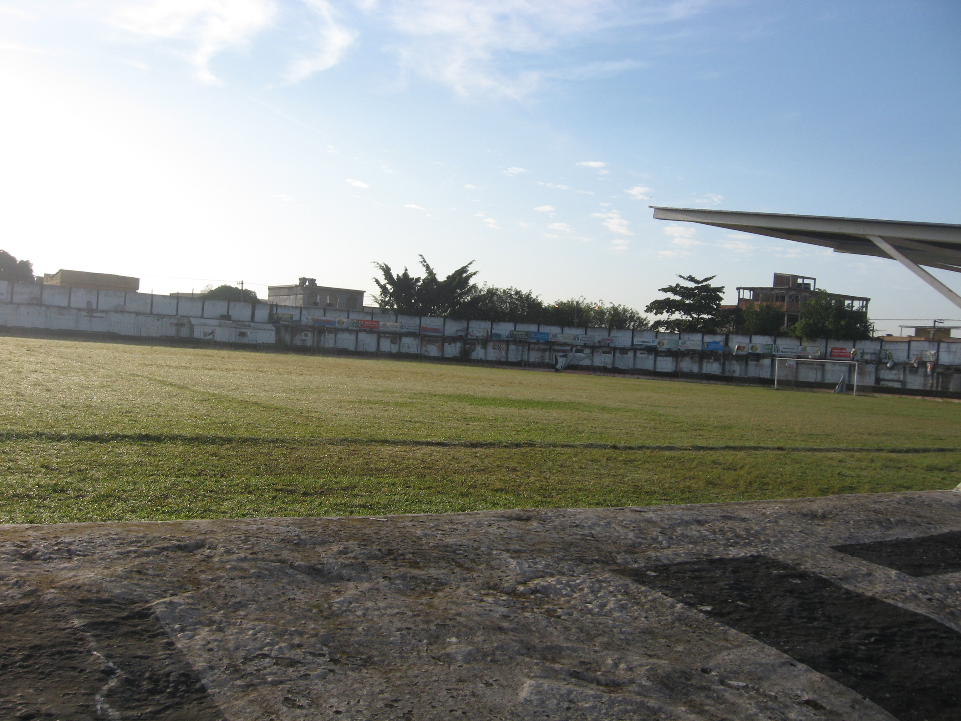 Estádio do Mesquita, Nielsen Louzada